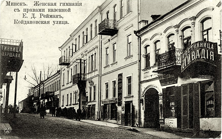 Беларуская (тарашкевіца): Менск (Miensk), вуліца Койданаўская (vulica Kojdanaŭskaja)